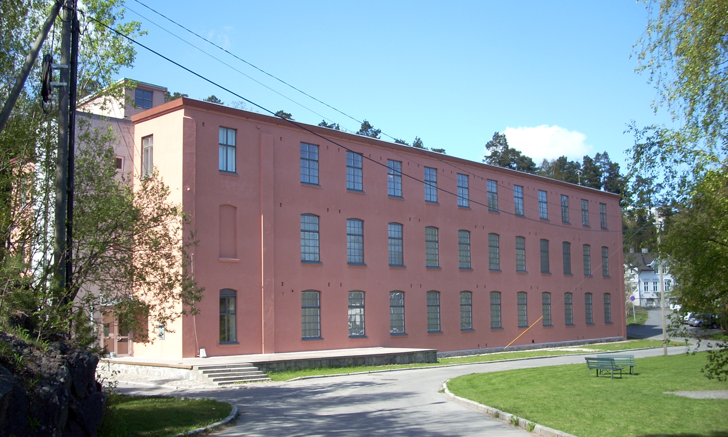 Bomuldsfabriken Kunsthall i Arendal